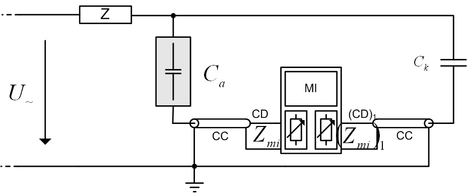 Brückenschaltung zur TE-Messung mit 2 gleichartigen Prüfobjekten